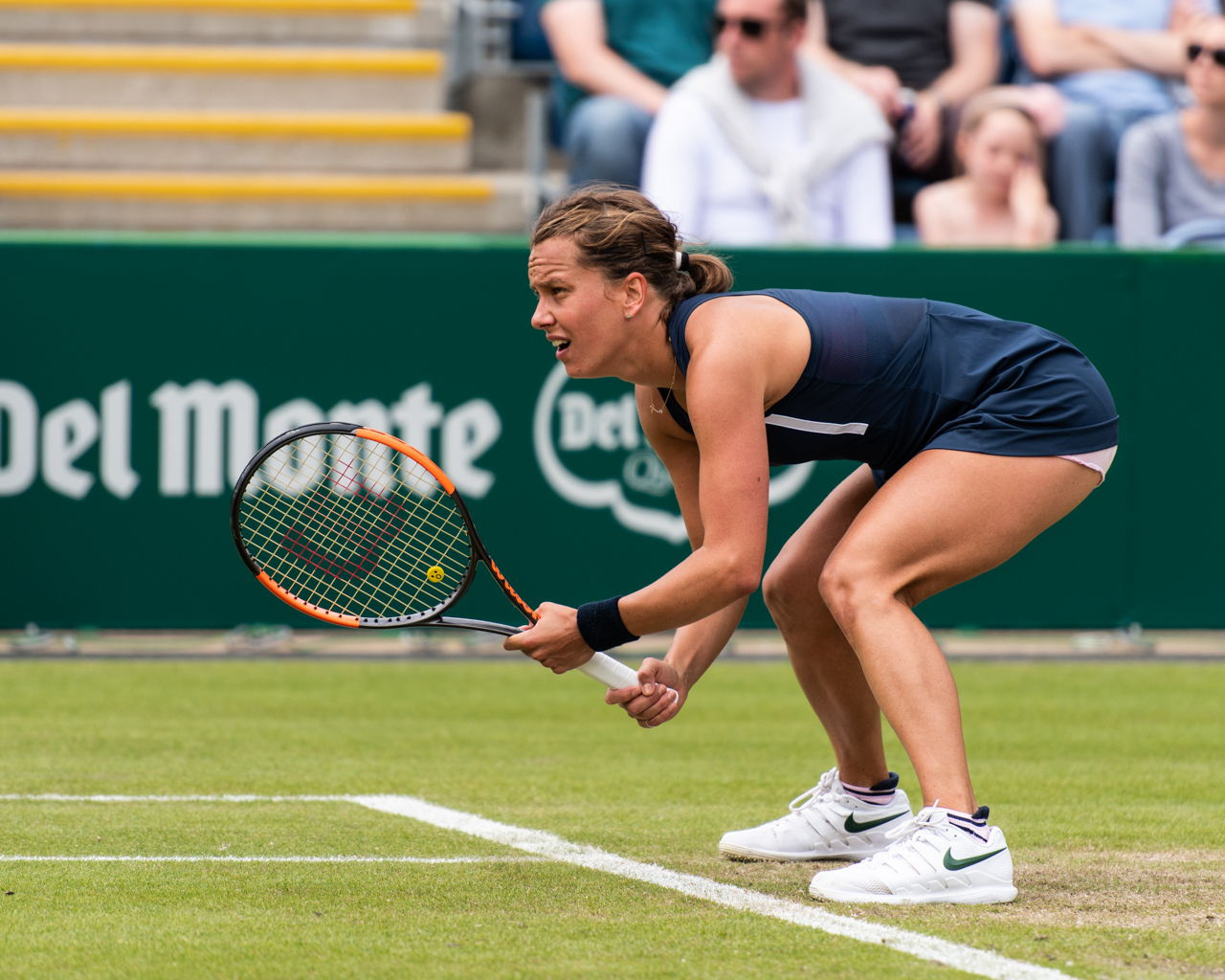 Bara Strycova